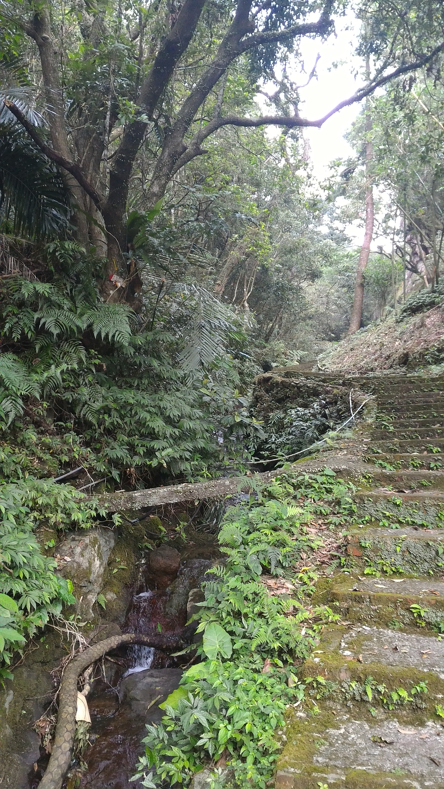 中文（台灣）: 基隆河源頭小橋，往石底觀音山的登山口，在臺灣新北市平溪區薯榔里。